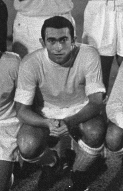 Pirri, Real Madrid footballer (cropped)